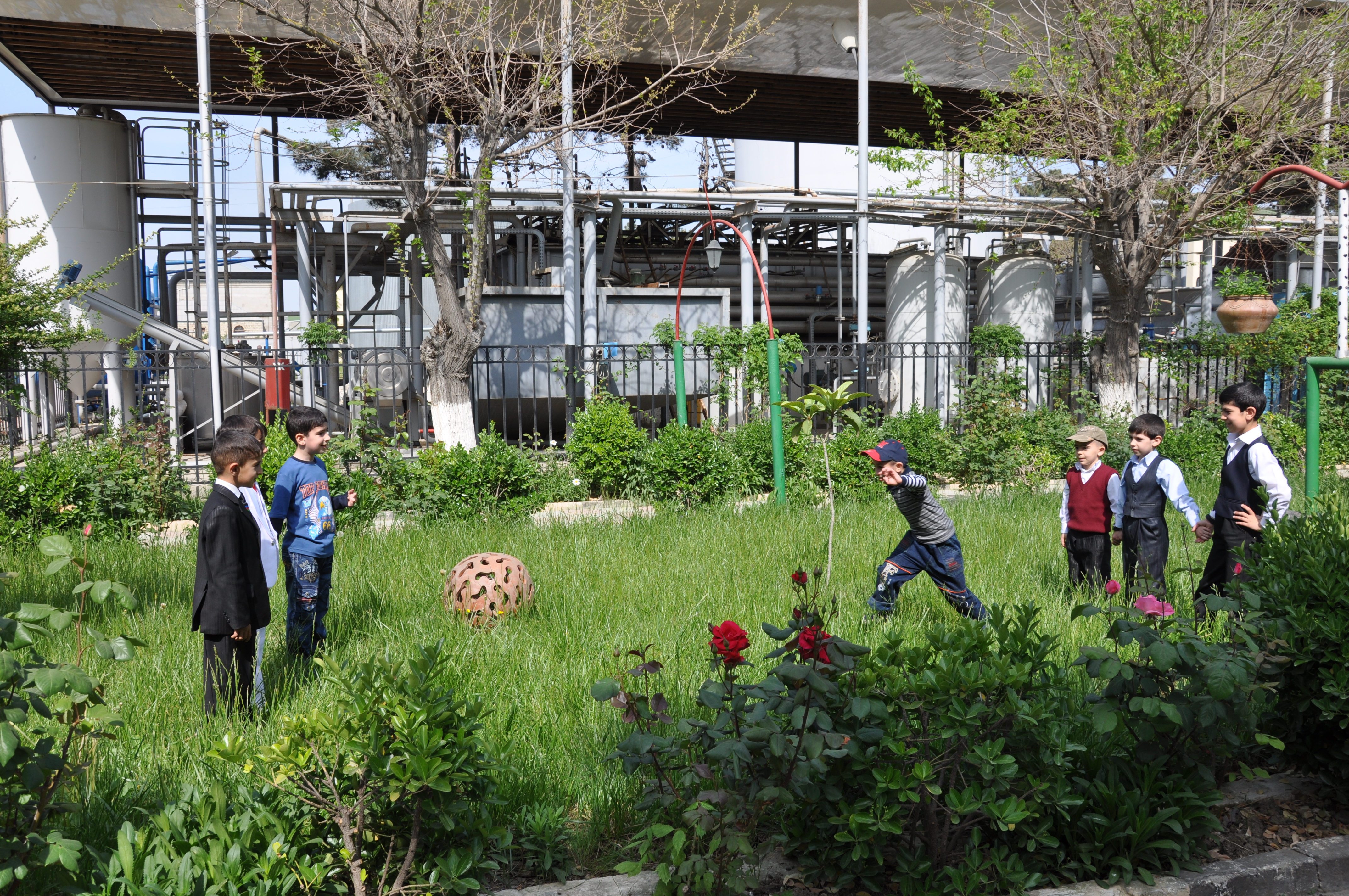 Bənövşə — Azərbaycanda çox yazqabağı (bayramqabağı) günlərdə, eləcə də bayramlarda və digər el şənliklərində gənclər və uşaqlar arasında geniş şəkildə bu gündə oynanılan qədim oyun növüdür.